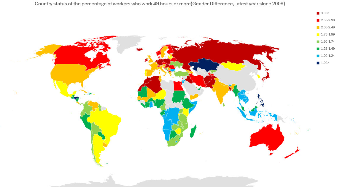 週労働49時間以上労働者の男女の割合における男女差の国別状況。数字が小さいほど、男女の長時間労働者の割合の差が小さく、1未満の場合、女性の方が多くなる。